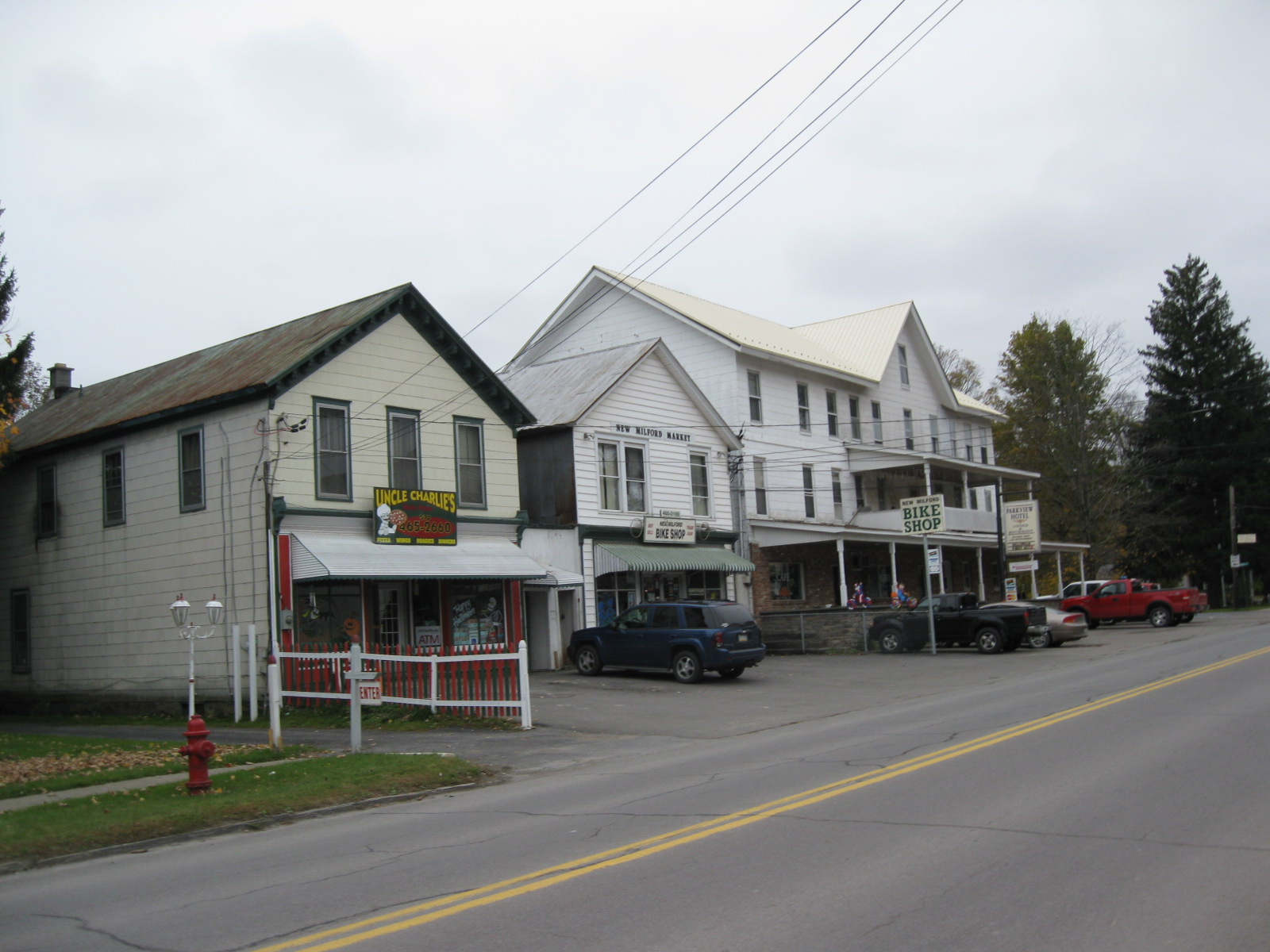 New Milford, Pennsylvania